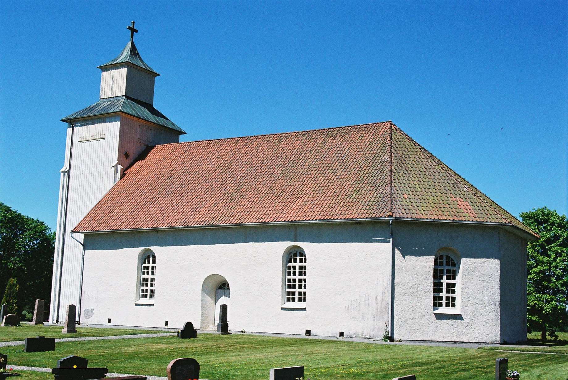 Kyrkan sedd fr...